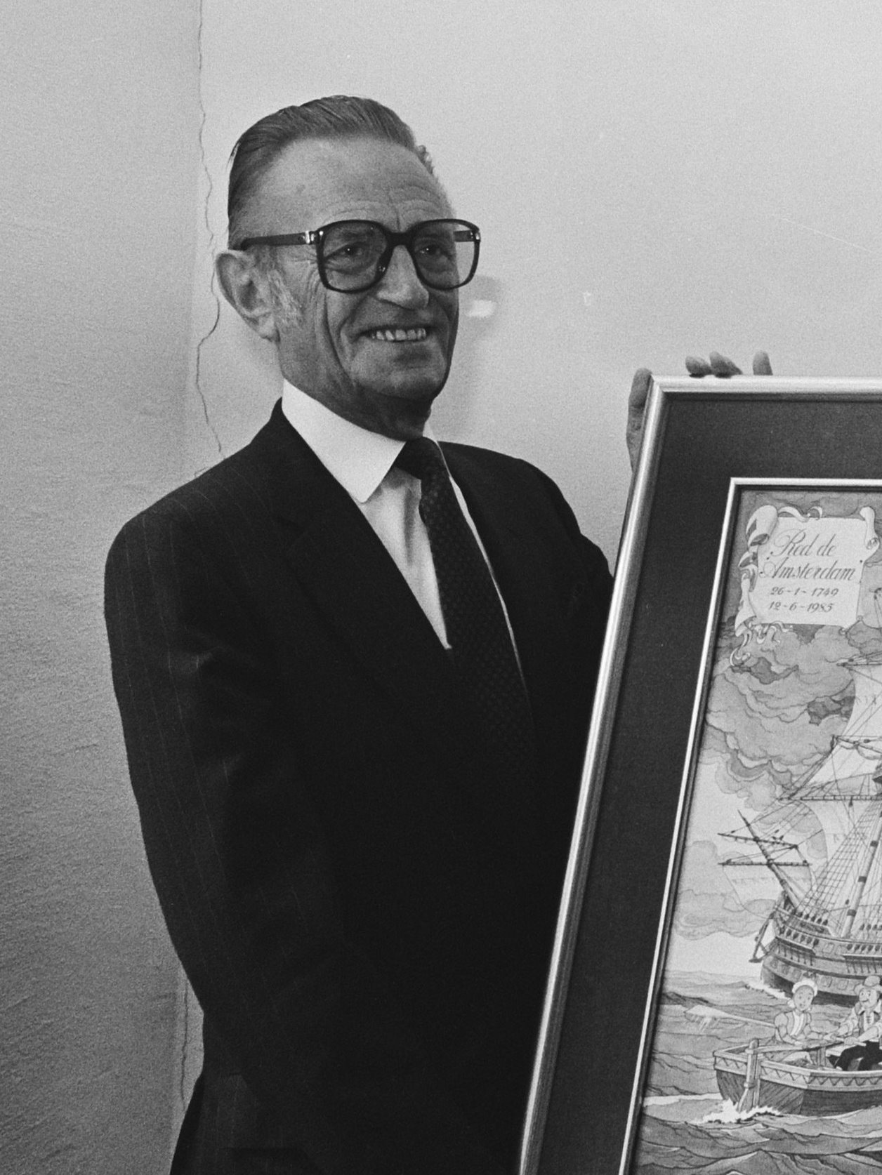 Willy Vandersteen met poster "Angst op de Amsterdam" bij persconferentie Stichting VOC schip "Amsterdam" Datum:12 juni 1985. Uitsnede van foto met Paul Geerts